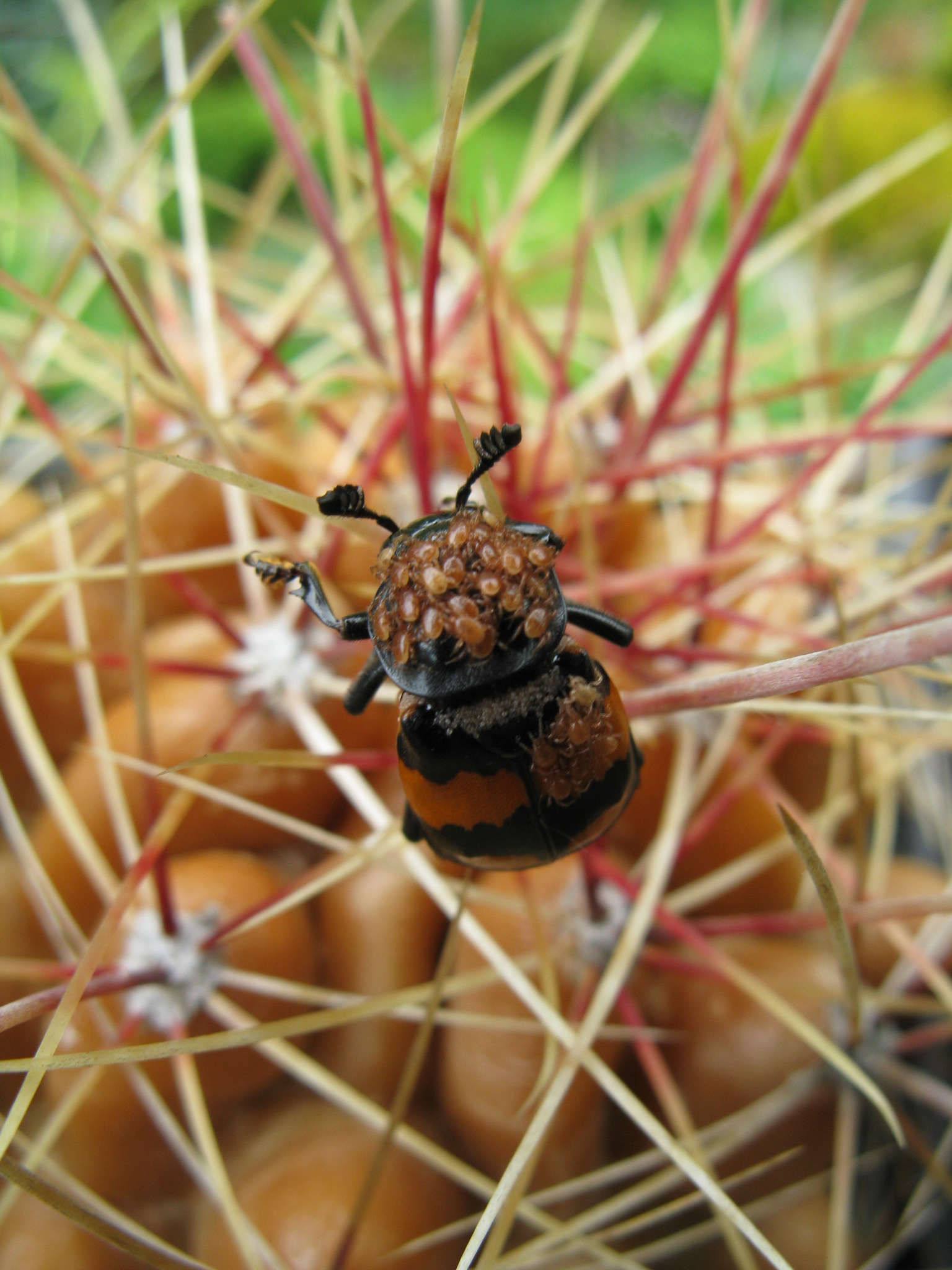 Hrobařík malý-obtěžkán roztoči